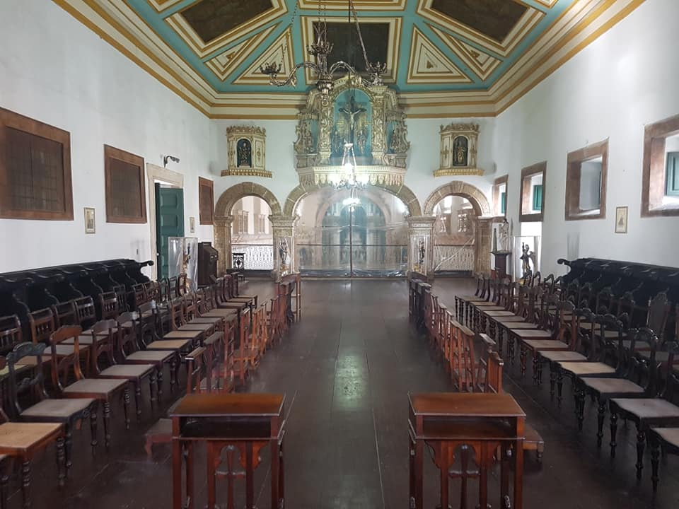 Côro alto do Convento do Desterro em Salvador, onde a Madre Vitória passava maior parte da noite em oração